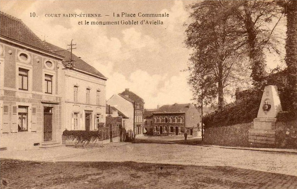 Place communale de Court Saint Etienne et le monument Goblet d'Alviella vers 1905.